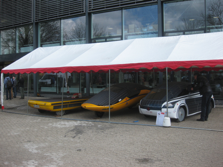 Solarfahrzeuge der Hochschule Bochum